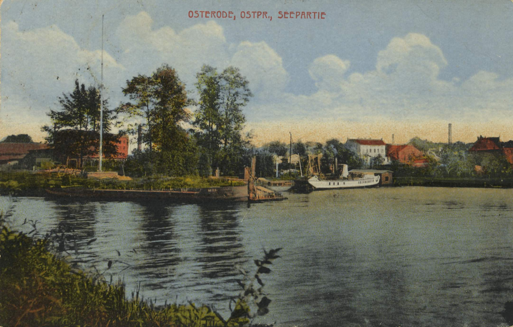 See